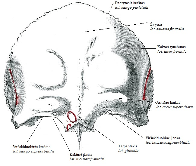 Kaktikaulis, os frontale. Vaizdas iš išorės